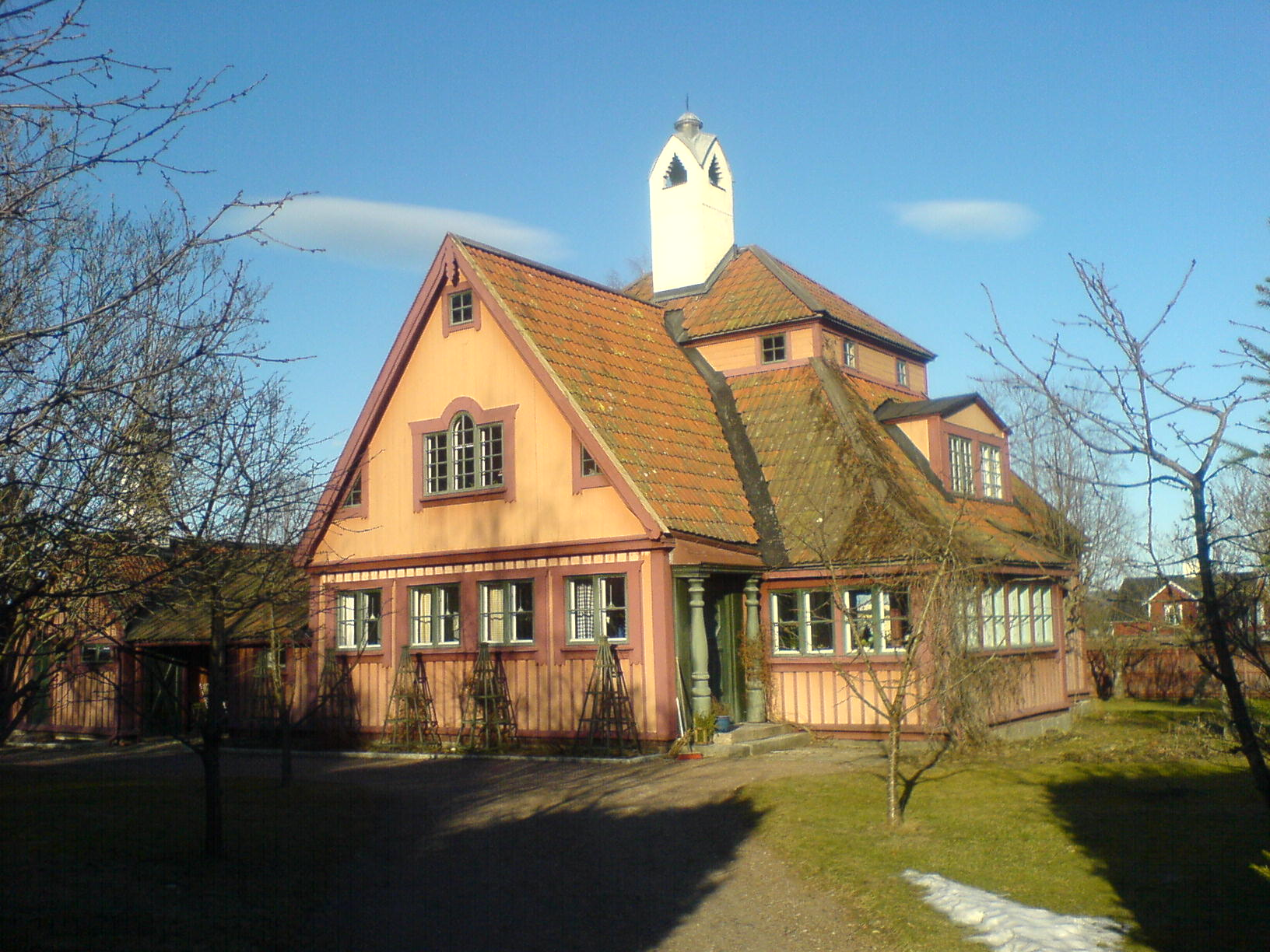 Trotzgården, Hedemora, Sweden